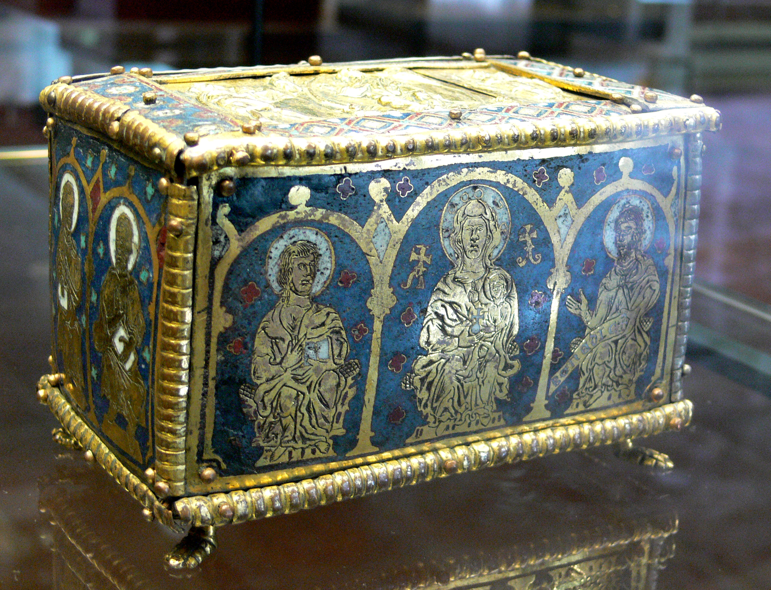 Kastenförmiges Reliquiar; Grubenschmelz, Kupfer vergoldet, Norddeutschland 13. Jh. Kunstgewerbemuseum Berlin, Inv. Nr. W 17